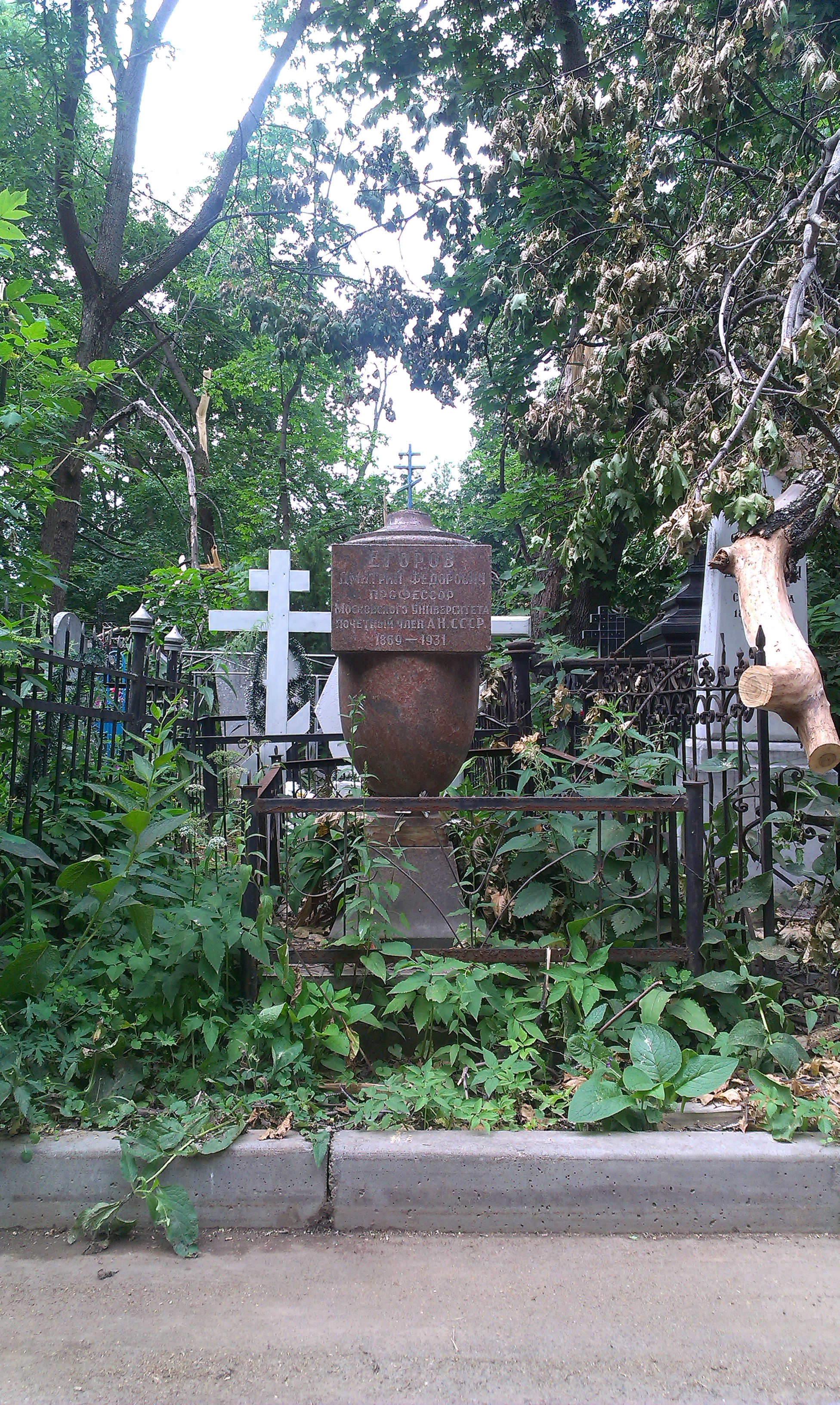 Арское кладбище